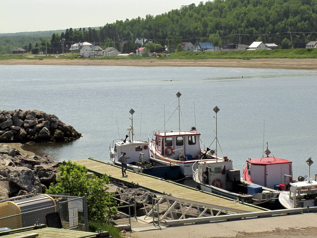 Harbour at Port Daniel, Quebec